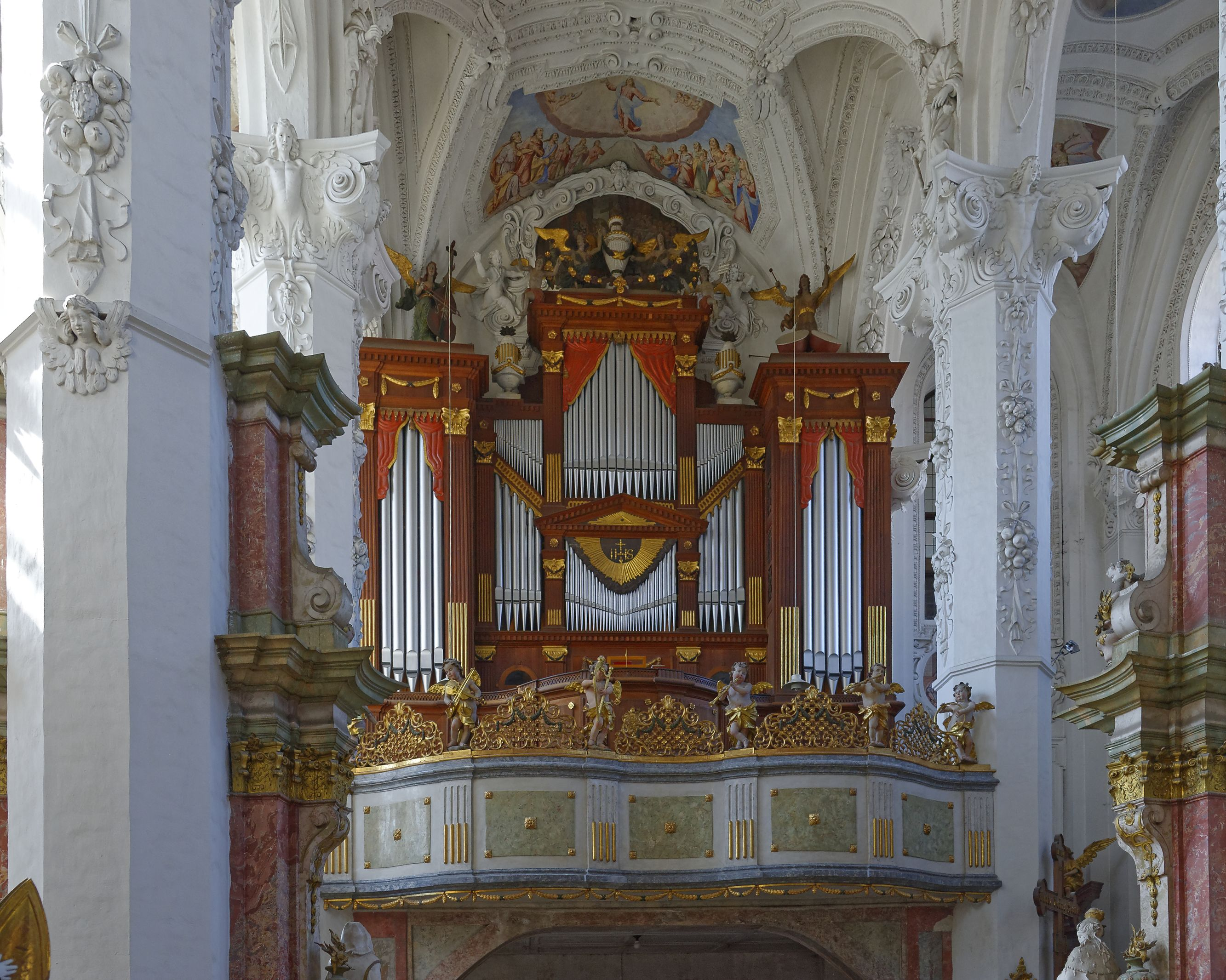 Kloster Neuzell - 2016